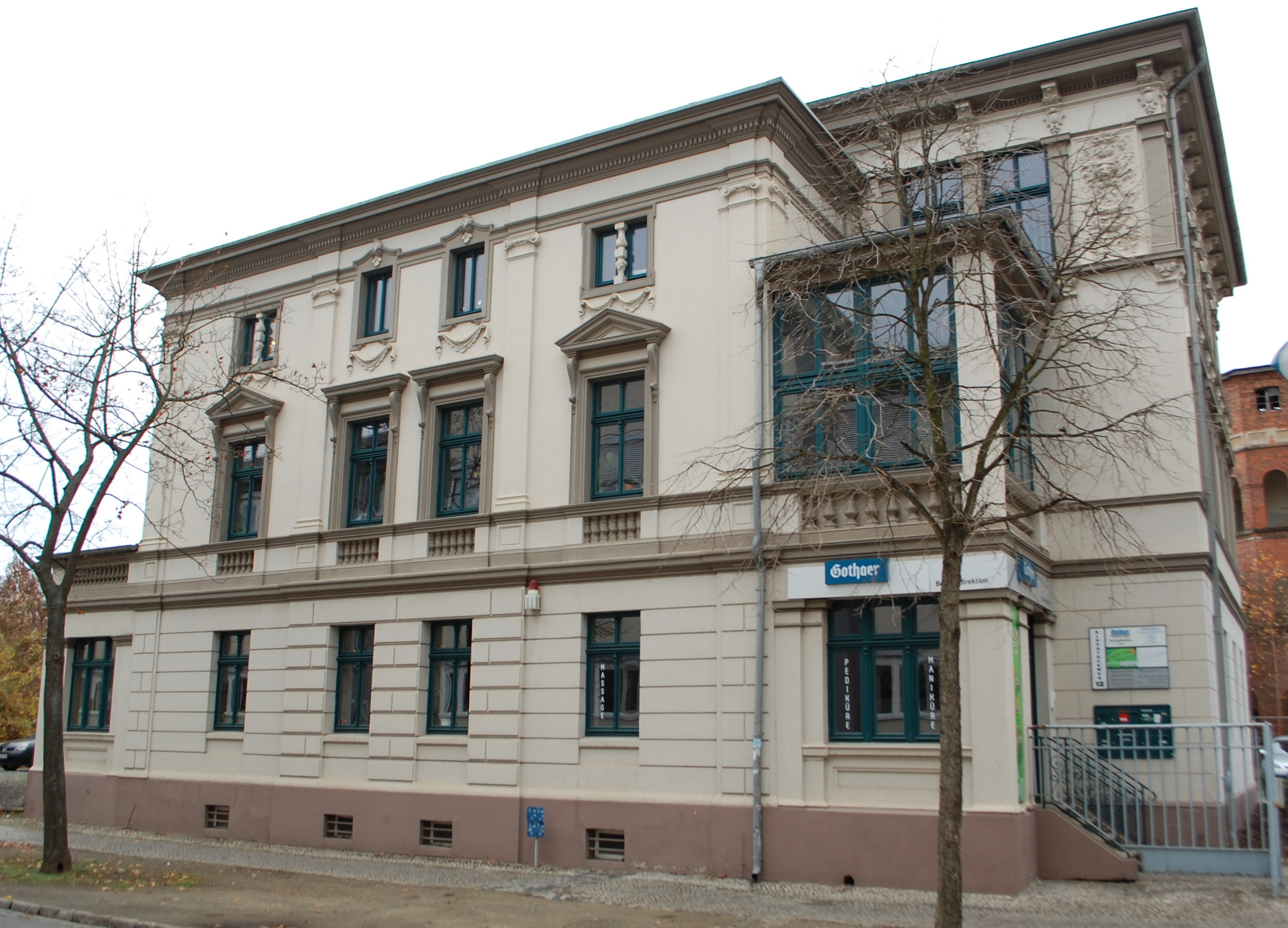 Haus Klopstockweg 12 in Quedlinburg